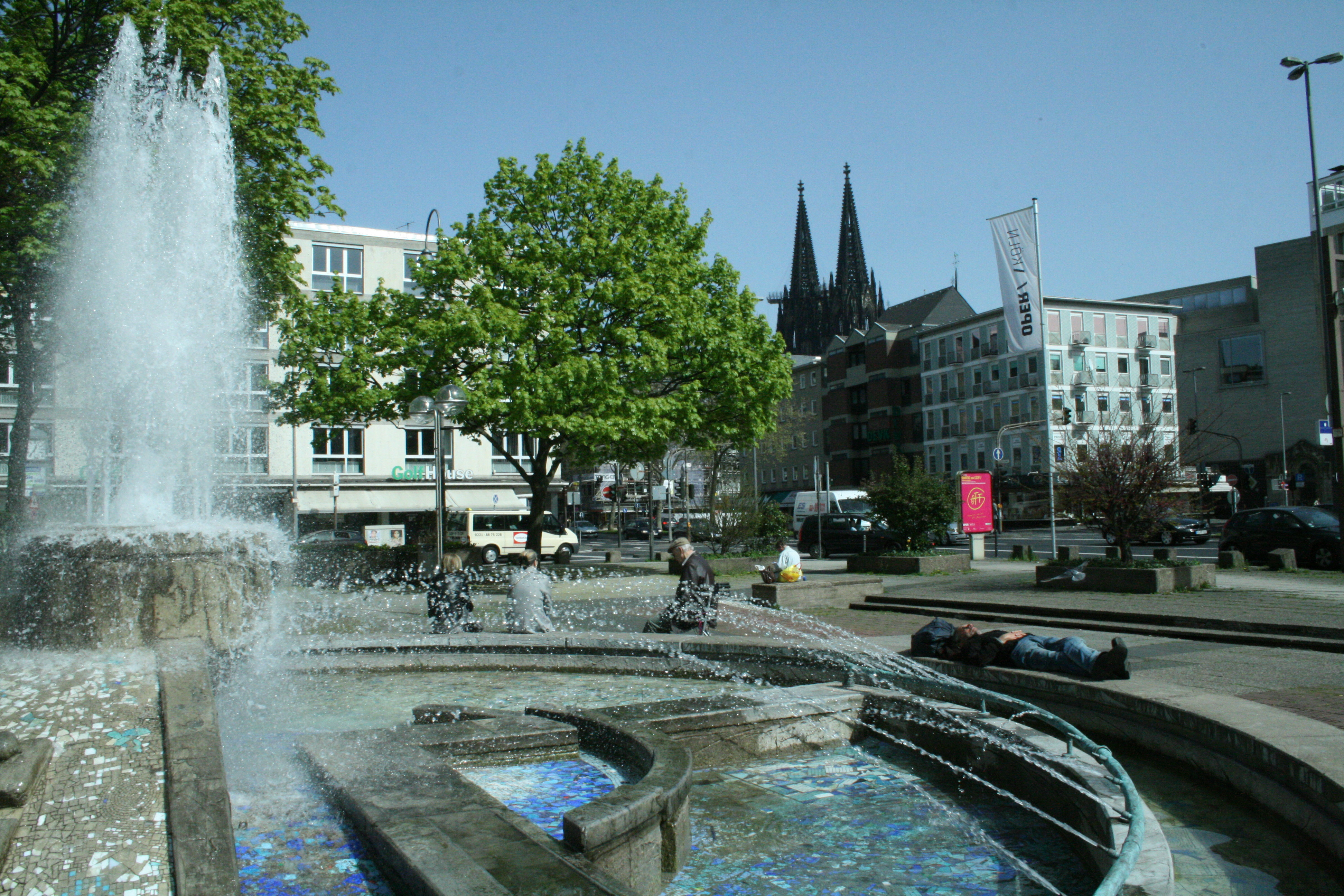 Opernbrunnen (Köln) nach Entkalkung der Wasserrohre und Düsen im April 2011. Der Brunnen bleibt stark sanierungsgedürftig.